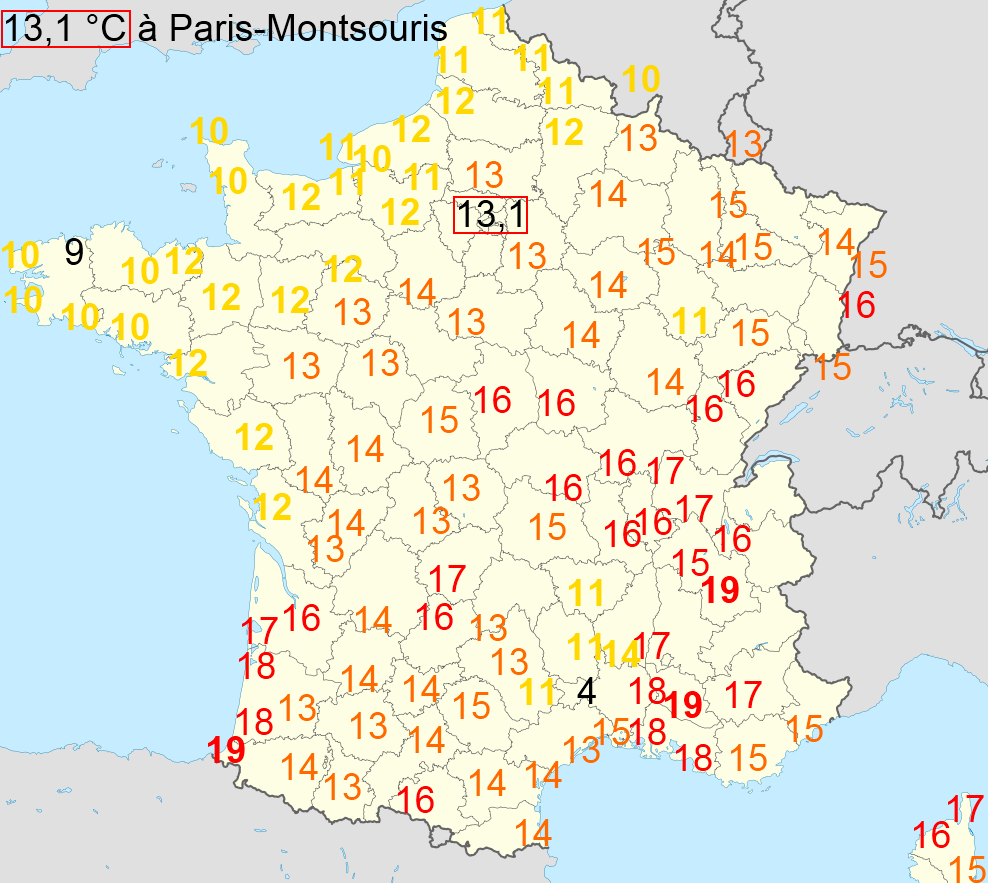 Température maxi du 8 janvier 2011 en France.